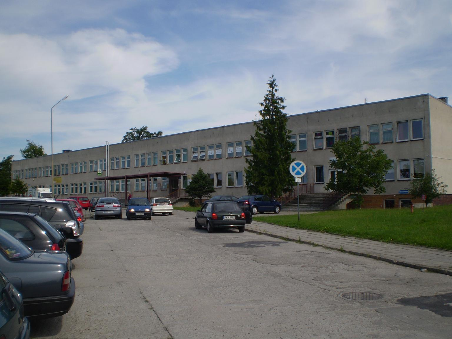 Gubin, ul. Gdańska 17 - Niepubliczny Zakład Opieki Zdrowotnej Przychodnia Specjalistyczna MEDICUS